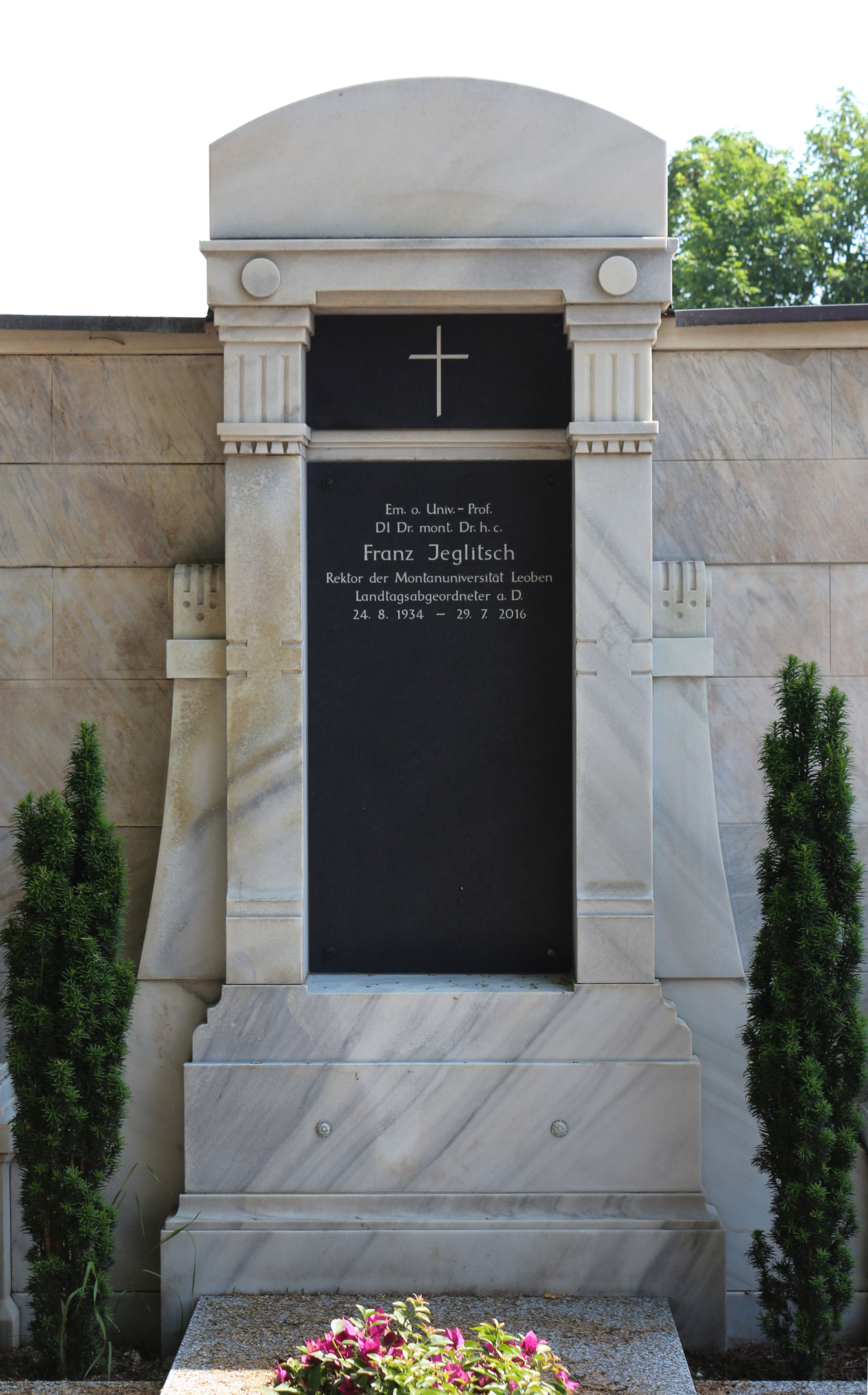 Grab von Em. o. Univ.-Prof. DI Dr. mont. Dr. h.c. Franz Jeglitsch am Zentralfriedhof Leoben